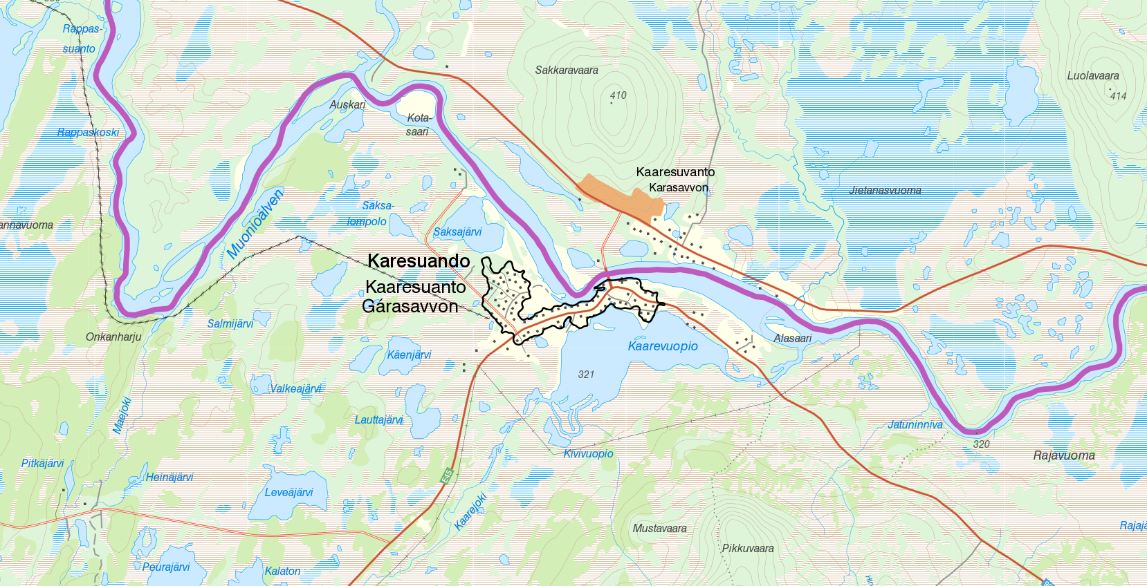 Tätorten Karesuando med gränserna från Statistiska centralbyråns tätortsavgränsning 2015. Bakgrundskarta från Lantmäteriet, skala 1:30 236.